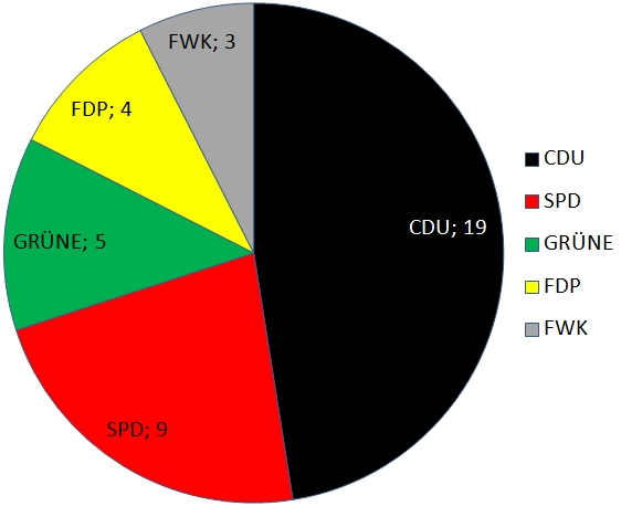 Ergebnisse der Kommunalwahl 2009 in Kempen. Sitzverteilung im Rat der Stadt Kempen.